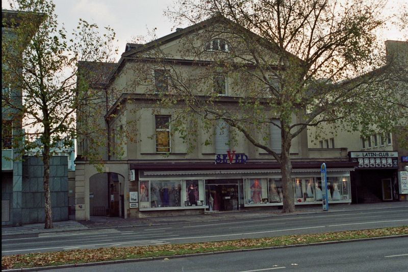 Gebäude der Ballettschule Münch mit historischem Portal